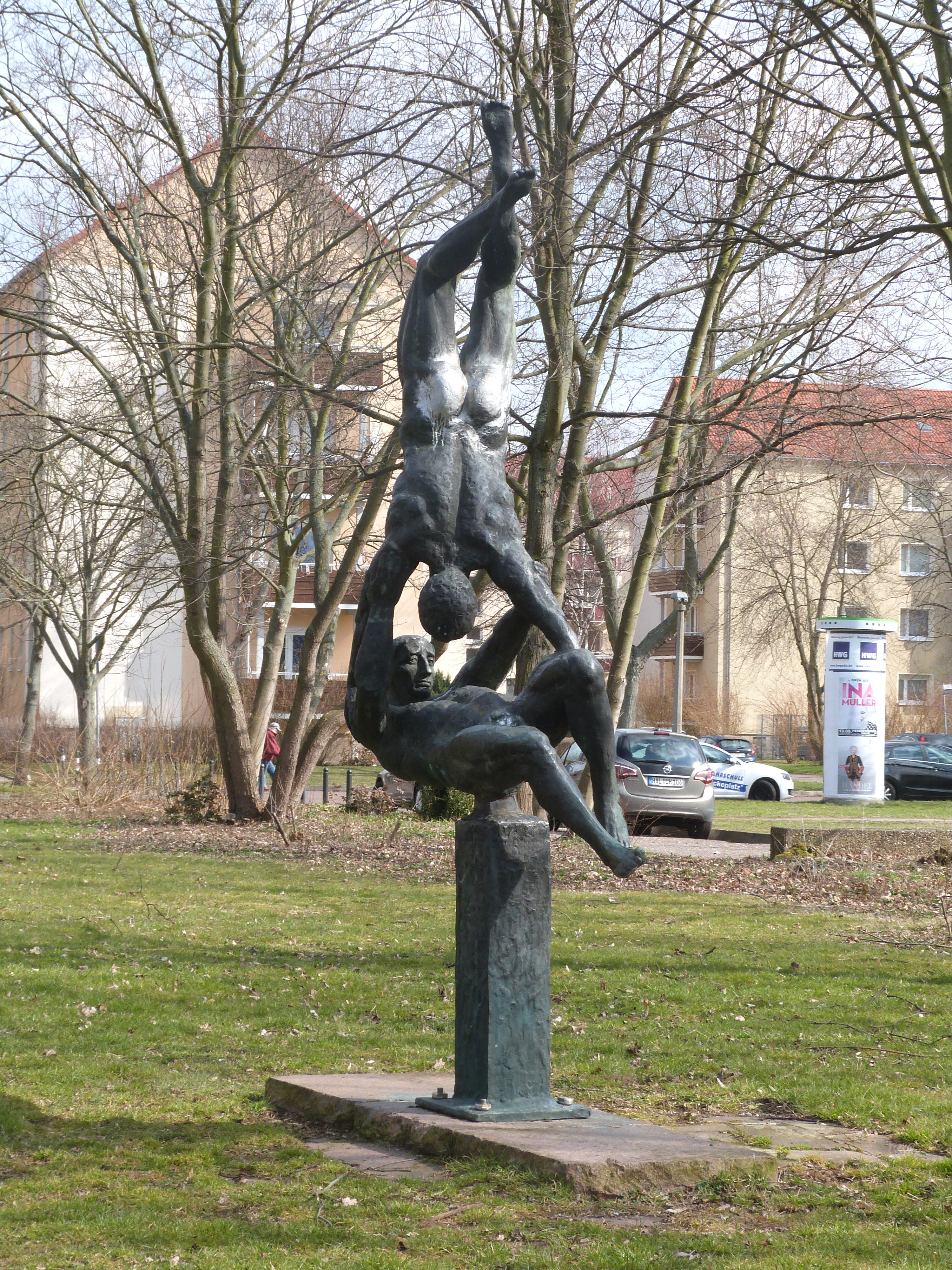 Südstadtpark, Halle (Saale), Bronzeplastik "Ikarus" von Heinz Beberniß